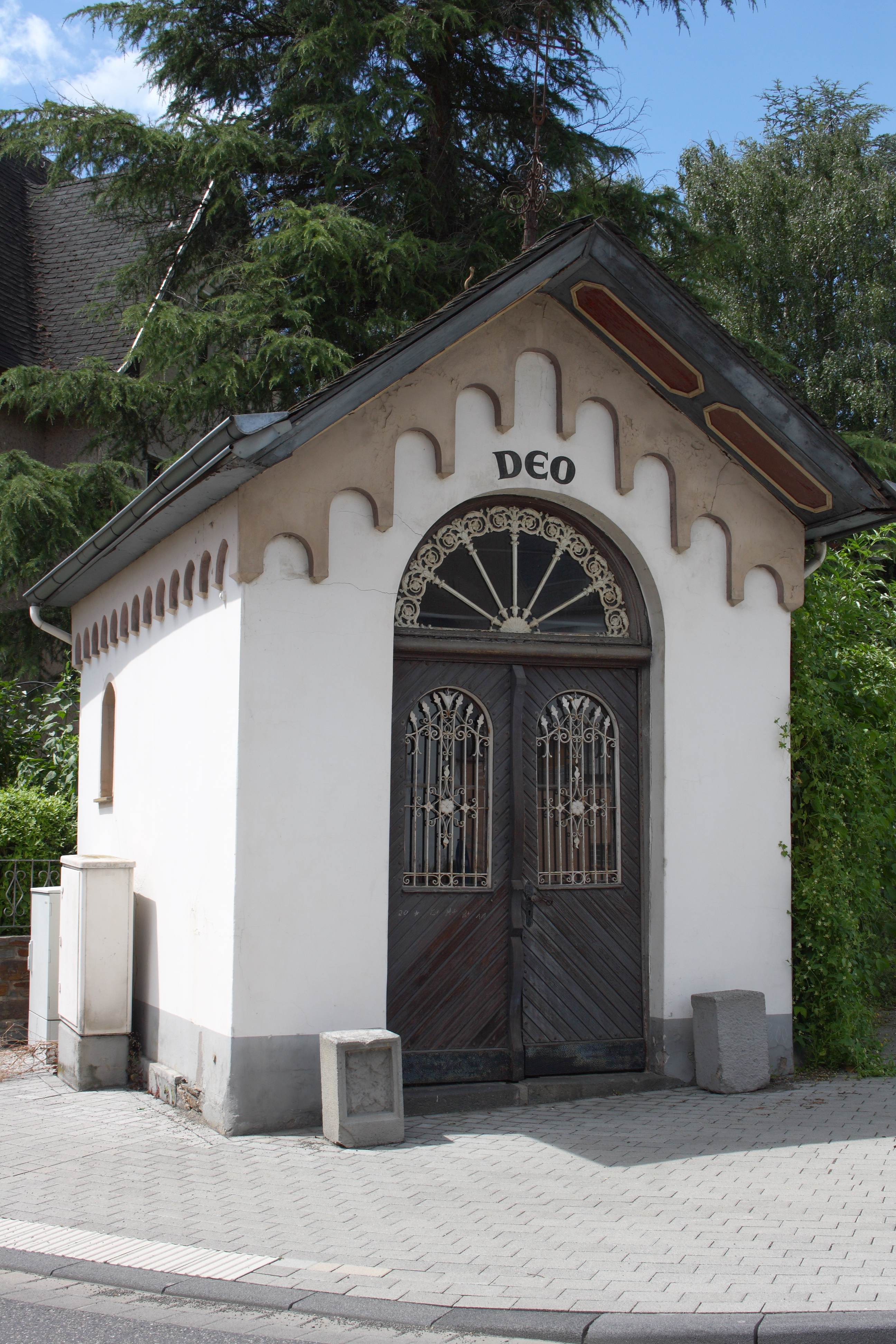 Kapelle an der Walporzheimer Straße/Im Plänzert (beim Kreisverkehr) in Ahrweiler